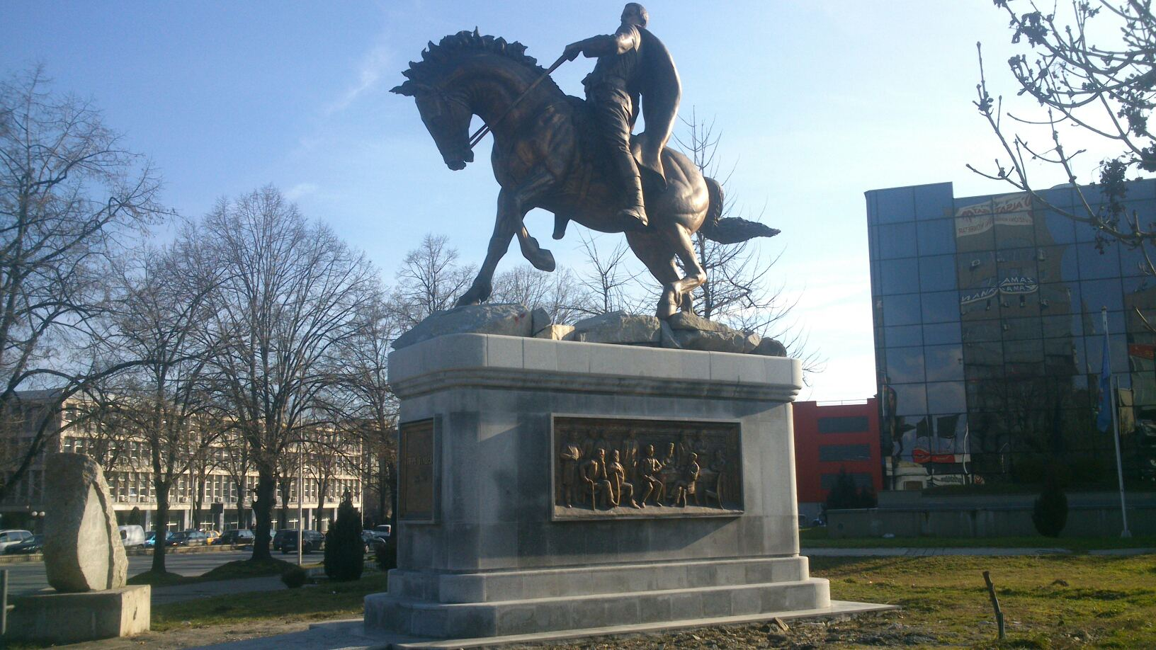 Споменик на Пере Тошев во Скопје